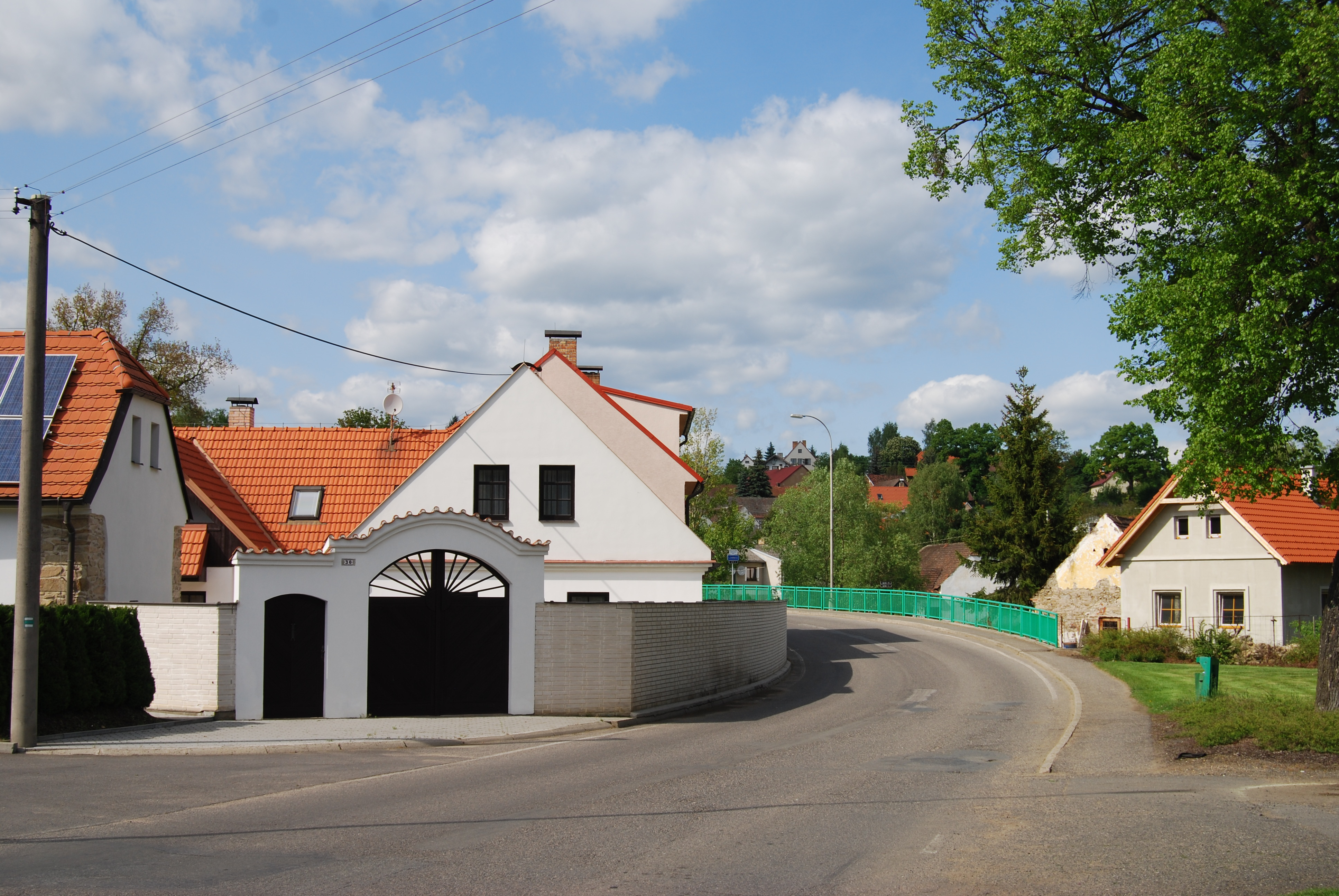 Pohled od návesní kaple směrem k mostu přes řeku Lomnici. Dolní Ostrovec jsou vesnice, části obce Ostrovec v okrese Písek. Česká republika.